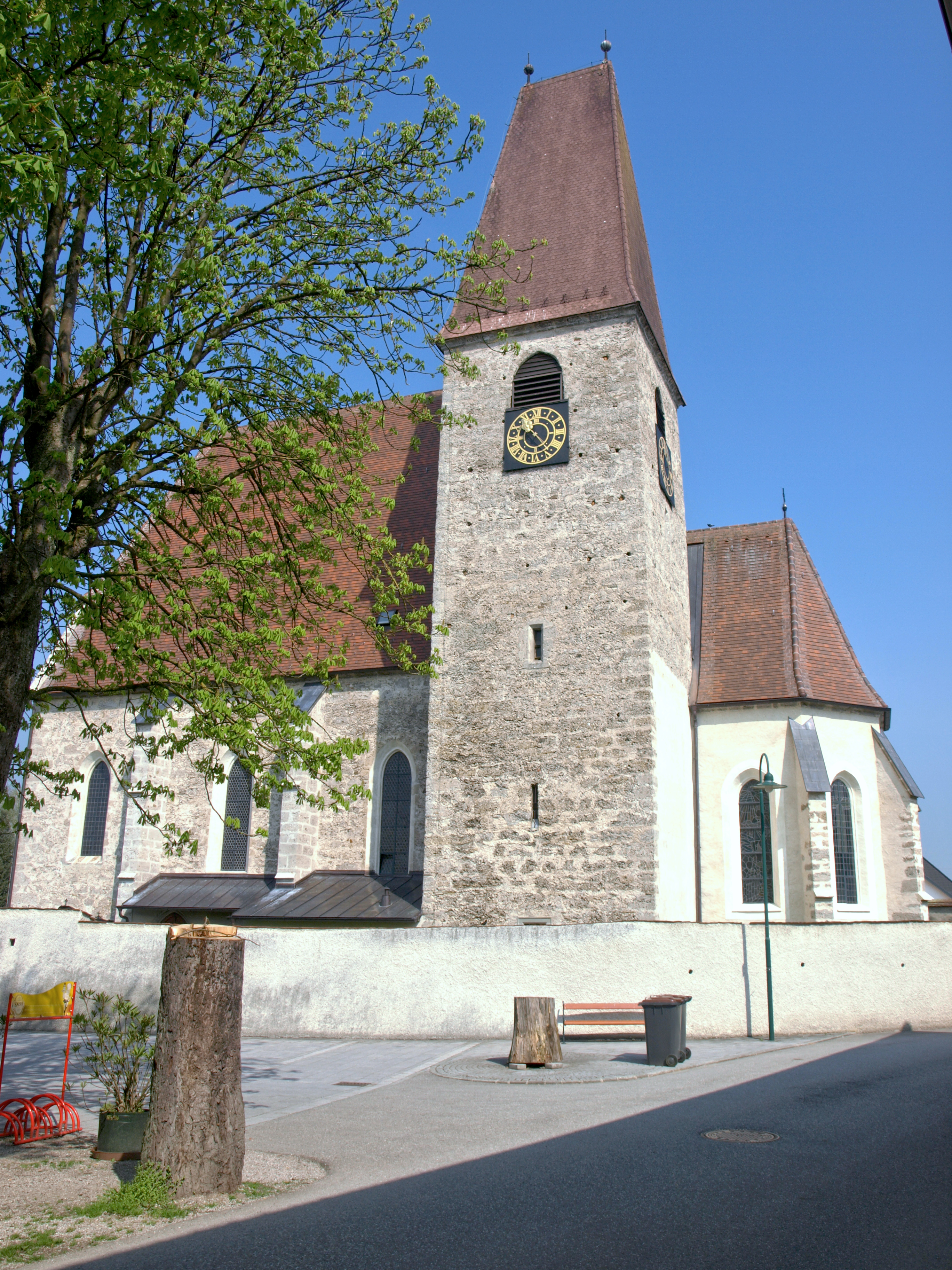 Kath. Pfarrkirche hl. Severin und Friedhof